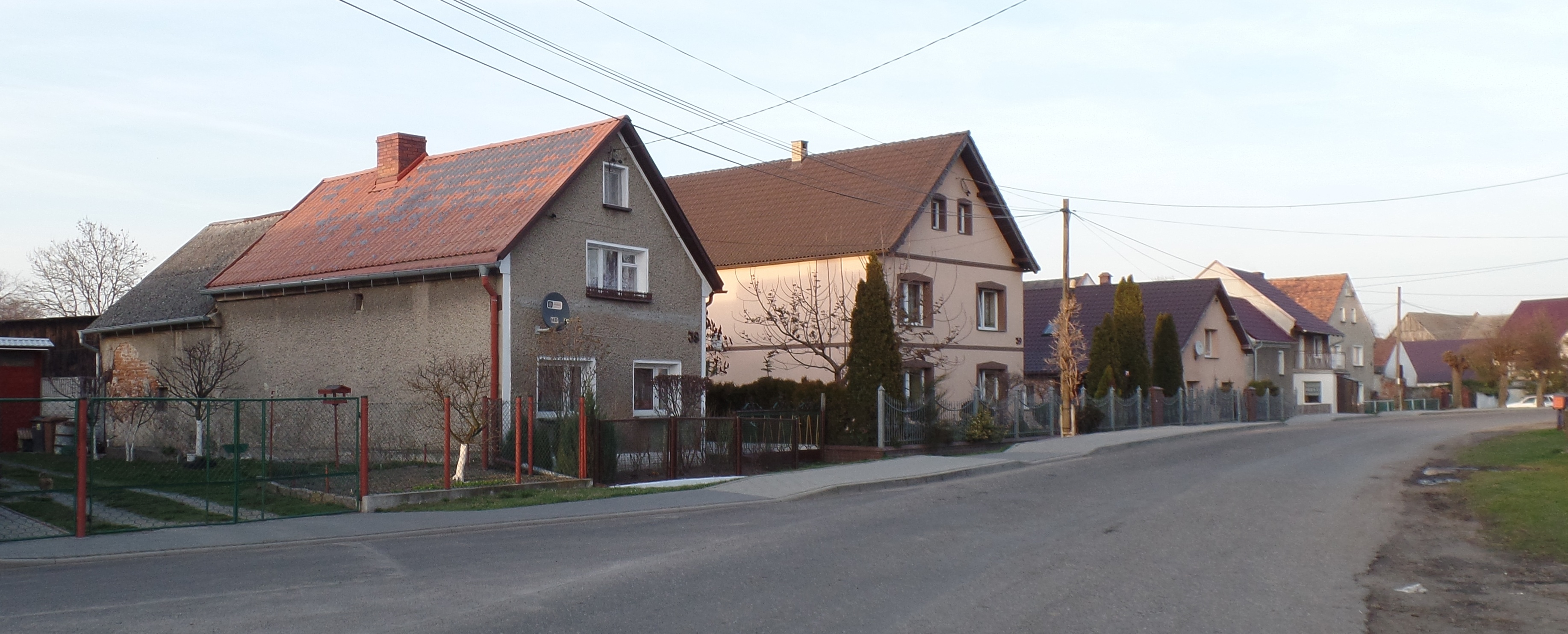 Zabudowania w Mesznie